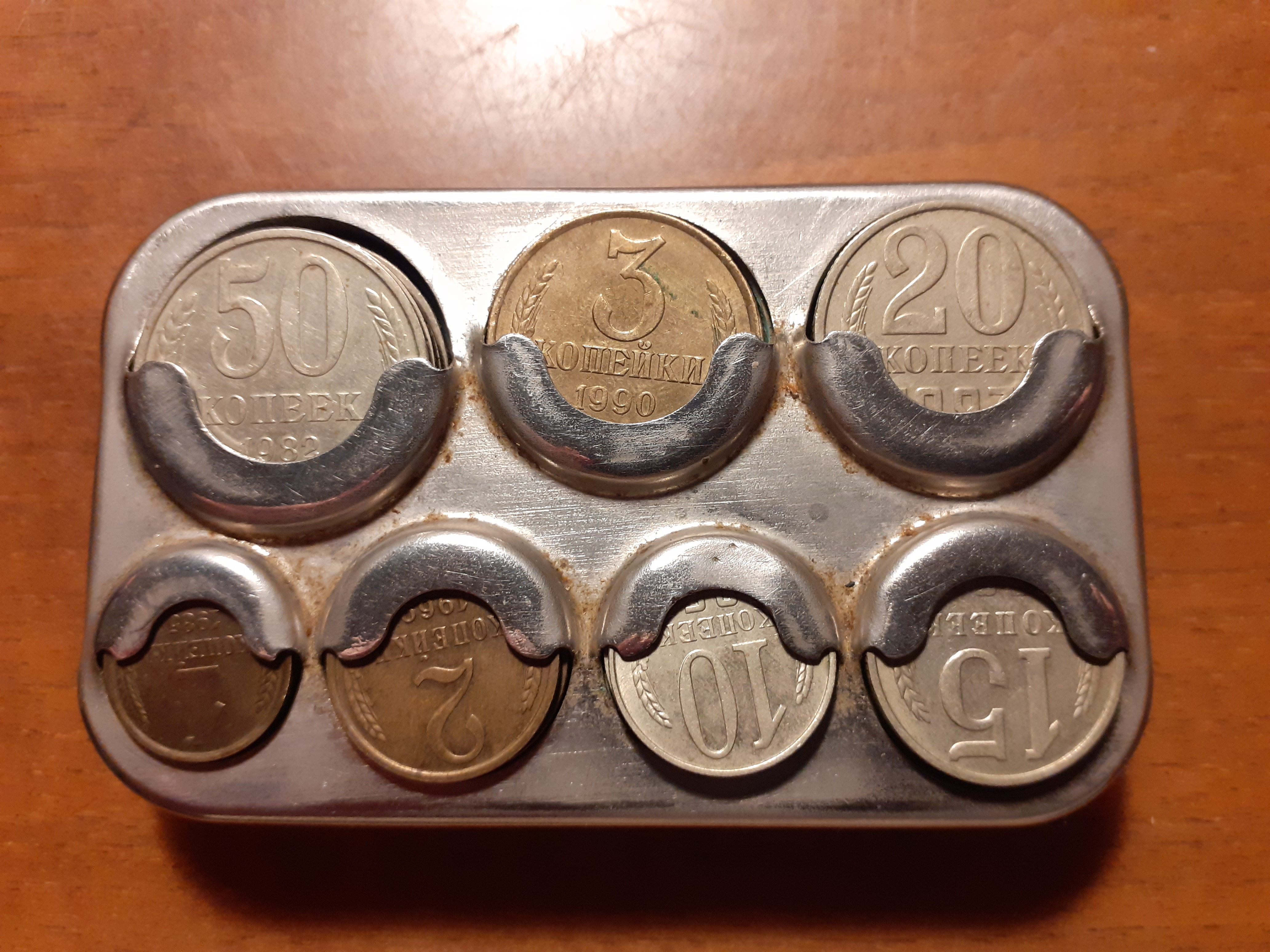 Монетница "Выборг", Ленинград, 1984 год. Цена 1 руб. 50 коп.